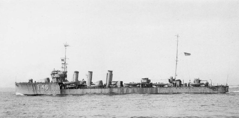 Der britische Zerstörer HMS SKATE in seiner Ursprungsform